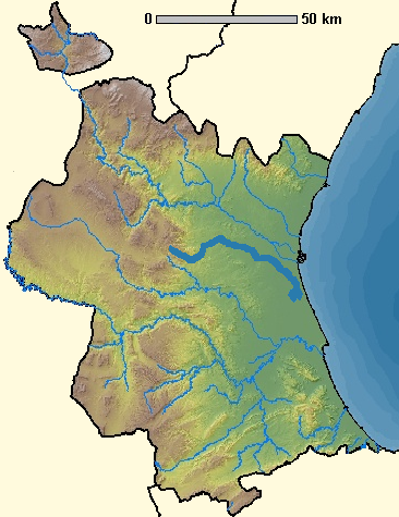 Localización de la rambla del Poyo respecto de la provincia de Valencia (España).